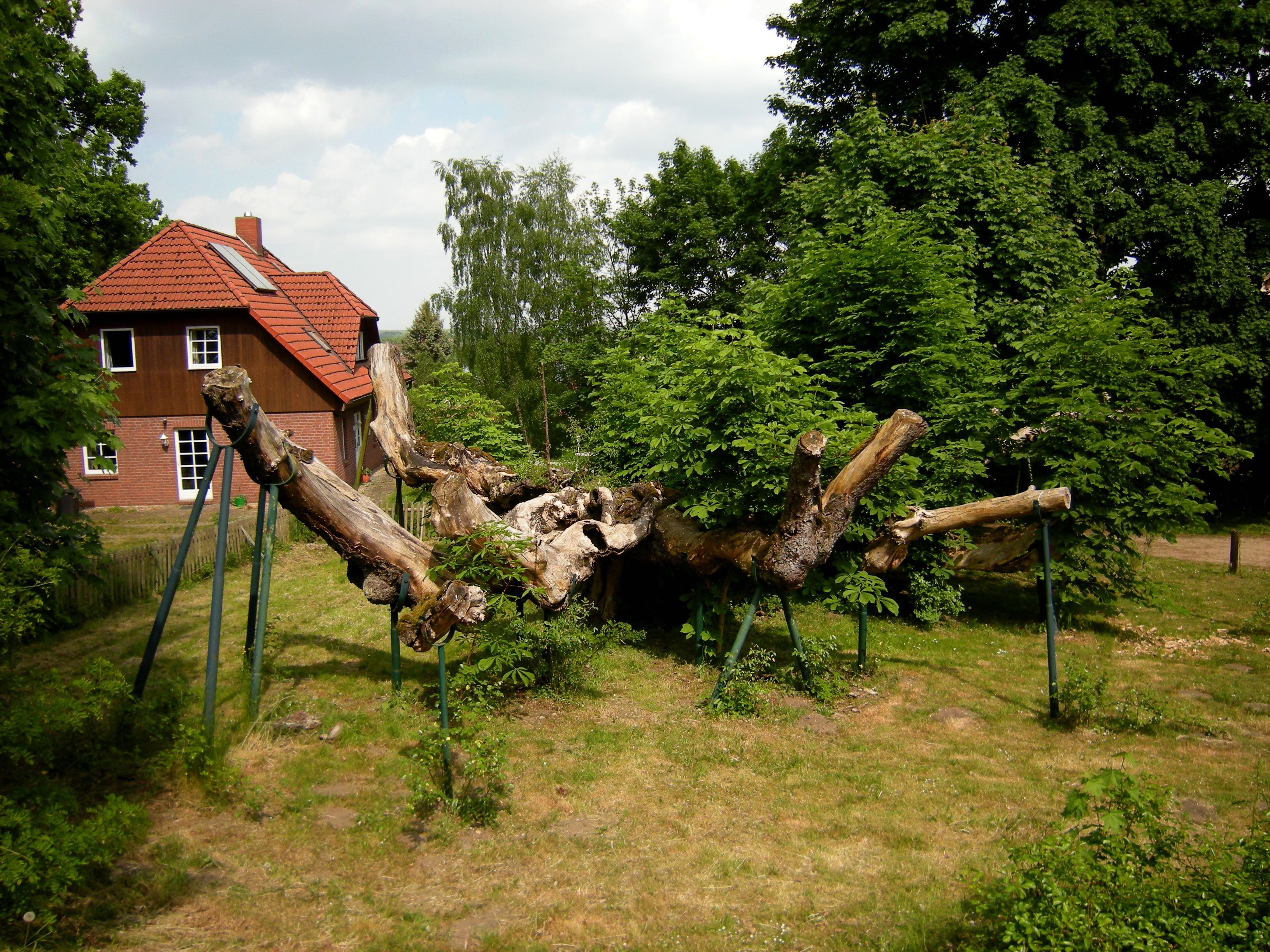 Hitzacker-Tanzkastanie ca. 1000 Jahre alt.jpg